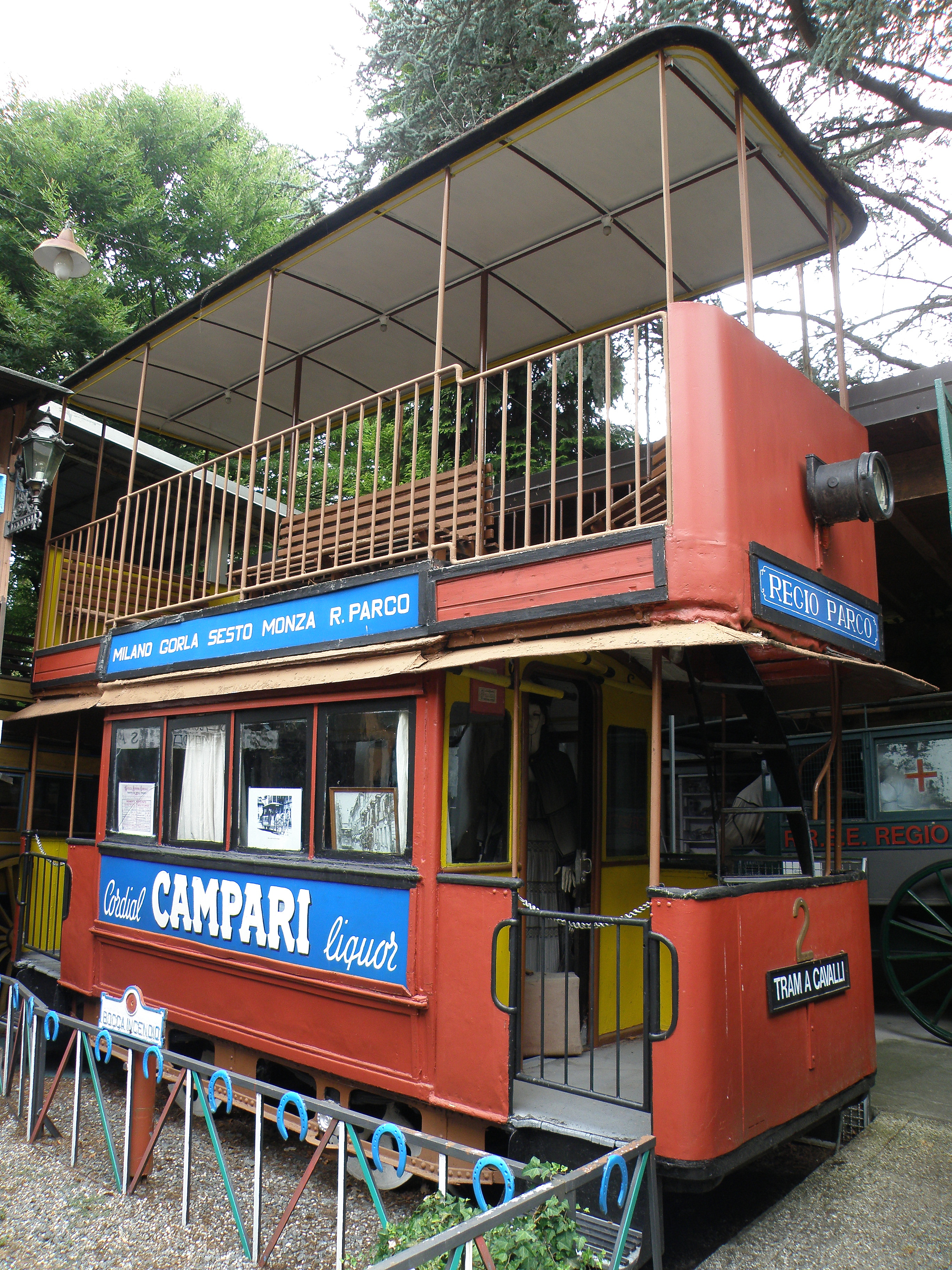 Vettura della tranvia a cavalli della Certosa di Pavia, truccata per ricordare i tram a cavalli a due piani della linea Milano-Monza. Conservata al museo dei trasporti Ogliari di Ranco